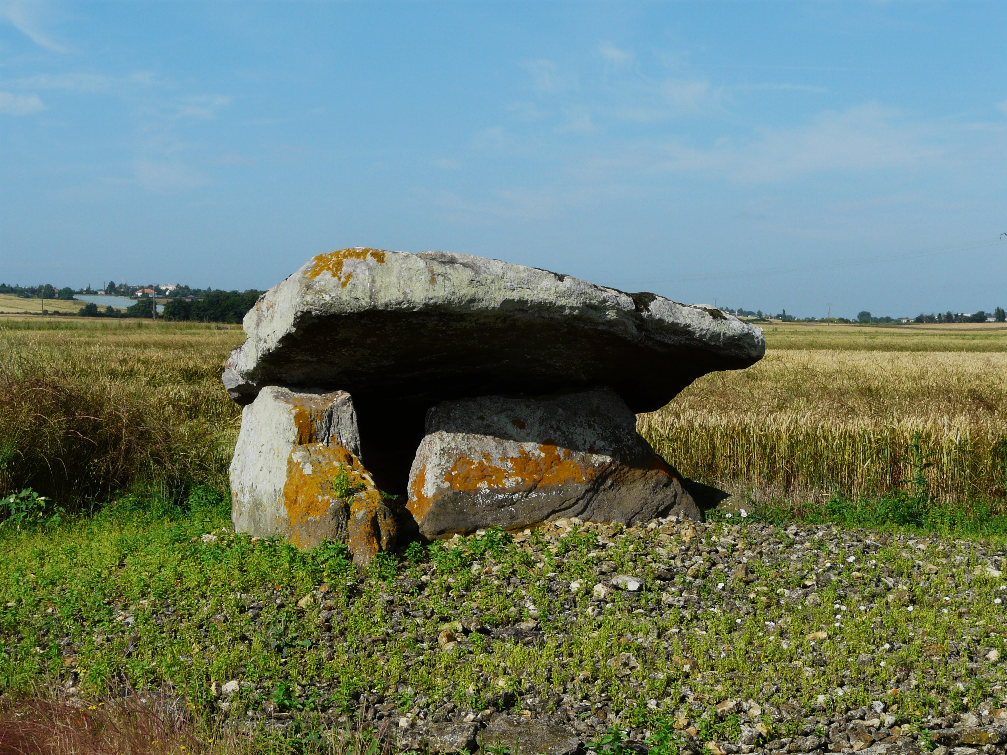 Dolmen n°1 de Pierre Levée de Puyraveau à Saint-Léger-de-Montbrun .